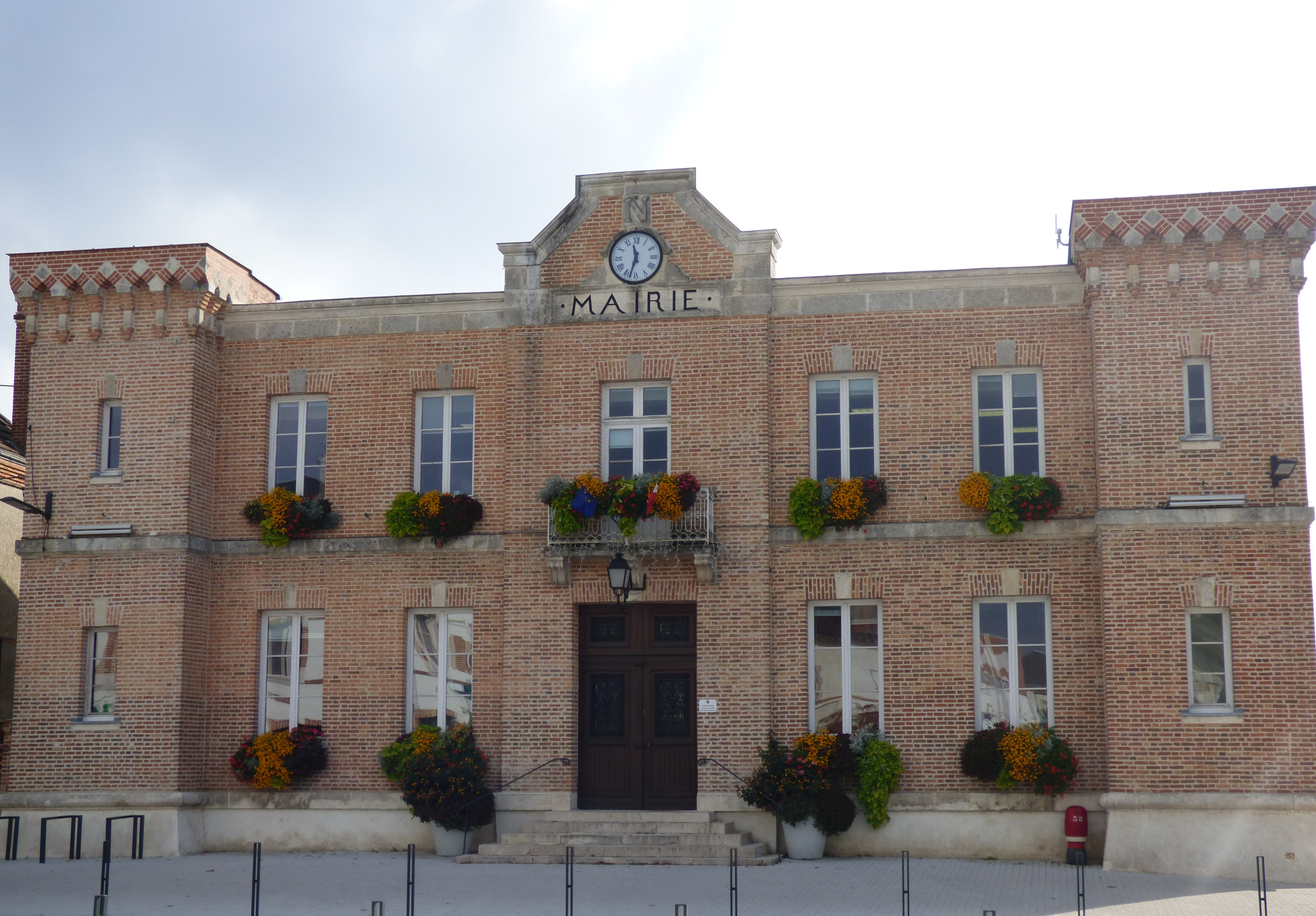 Mairie érigée par Napoléon III, d'où le N sur son fronton